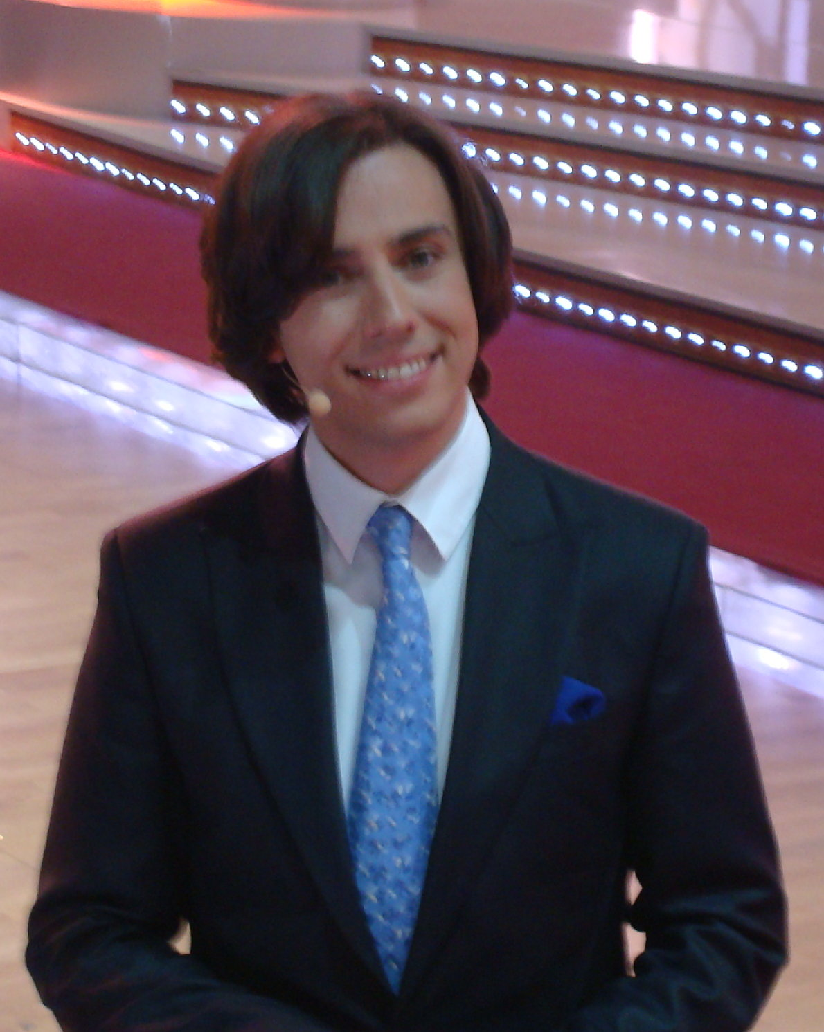 Максим Галкин во время съёмок проекта «Танцы со звёздами»